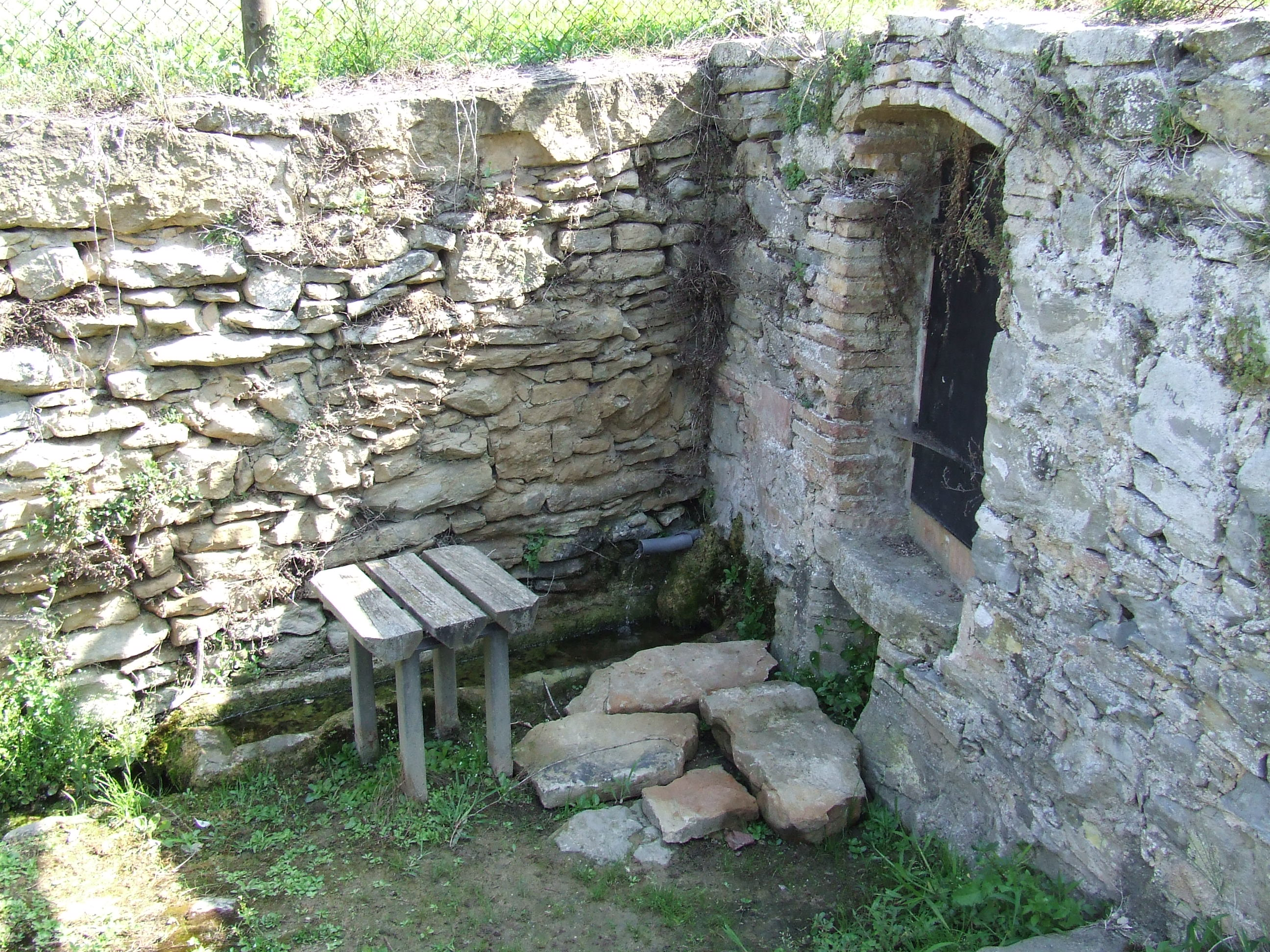 La Font del Poble (Castellcir, Moianès)